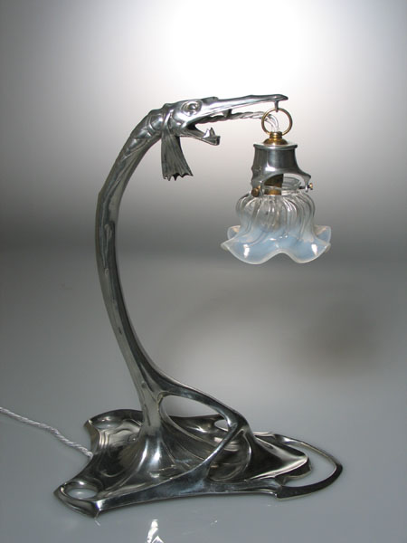 Beschreibung, Quelle und Lizenz Jugendstil-Tischlampe von Friedrich Adler (1900)